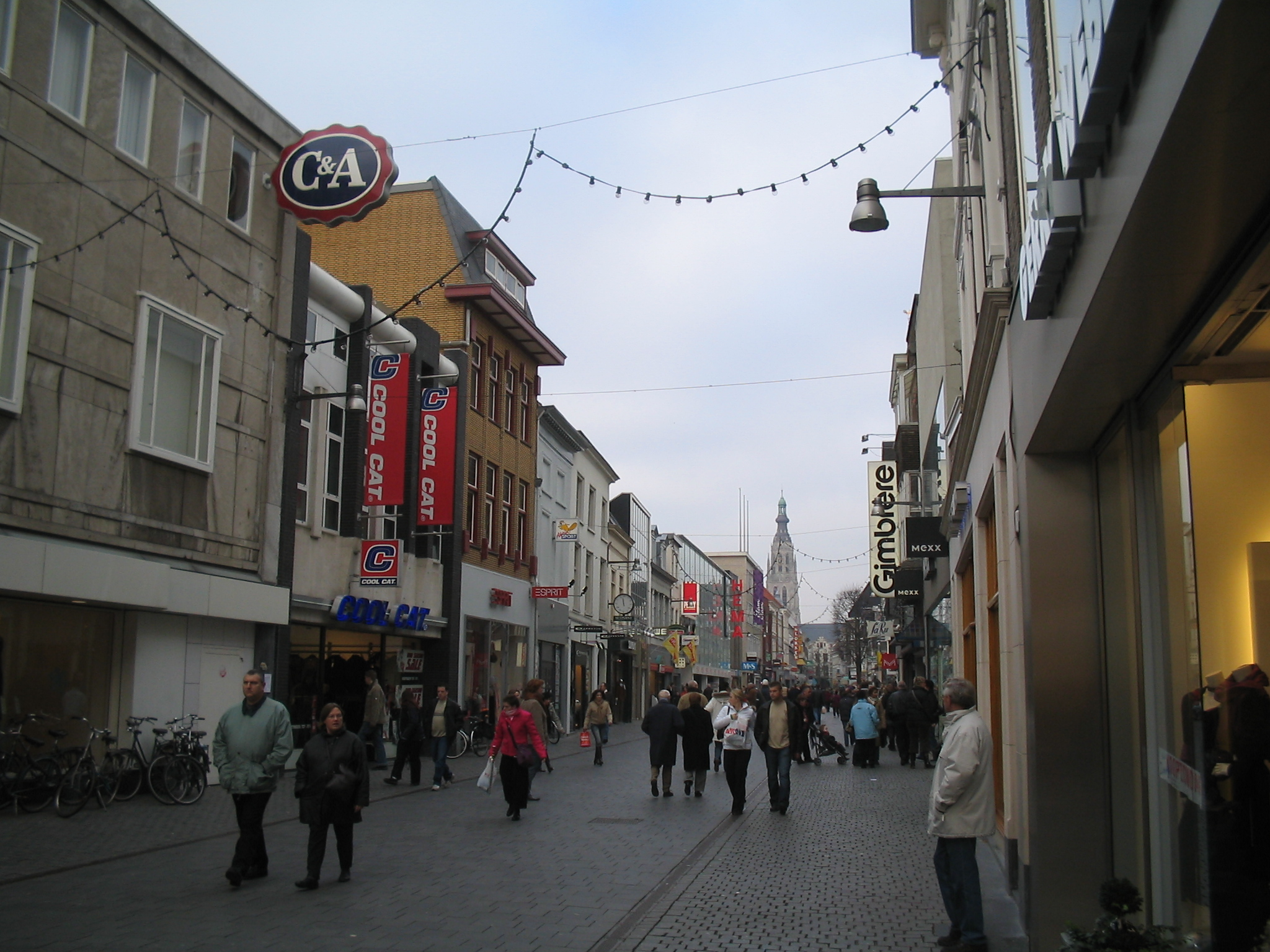 Zicht op een van de belangrijkste winkelstraten van het centrum van Breda de Ginnekenstraat, dec. 2005. Voetgangersgebied.